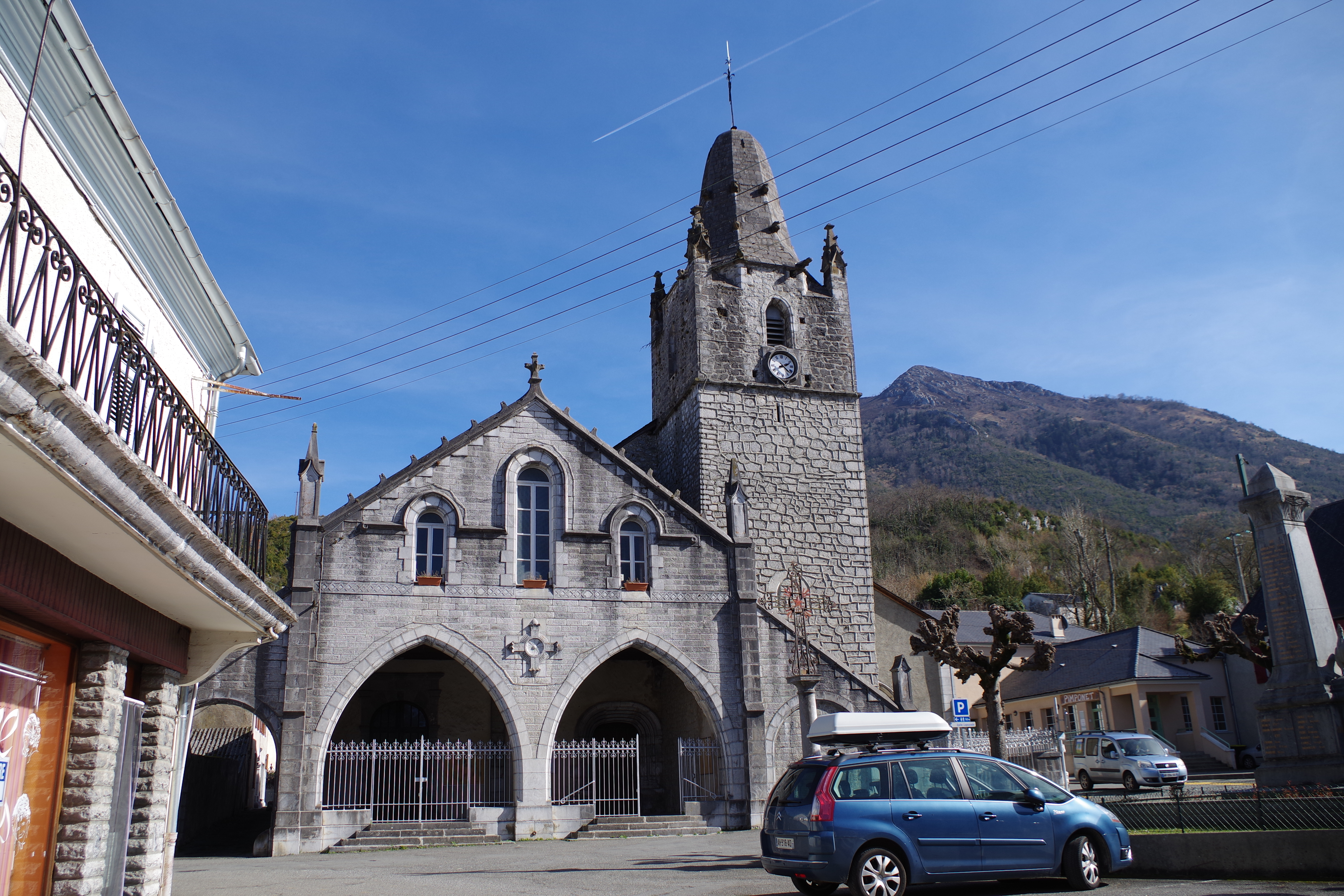 Façade occidentale de l'église Saint-Matin de Louvie-Juzon